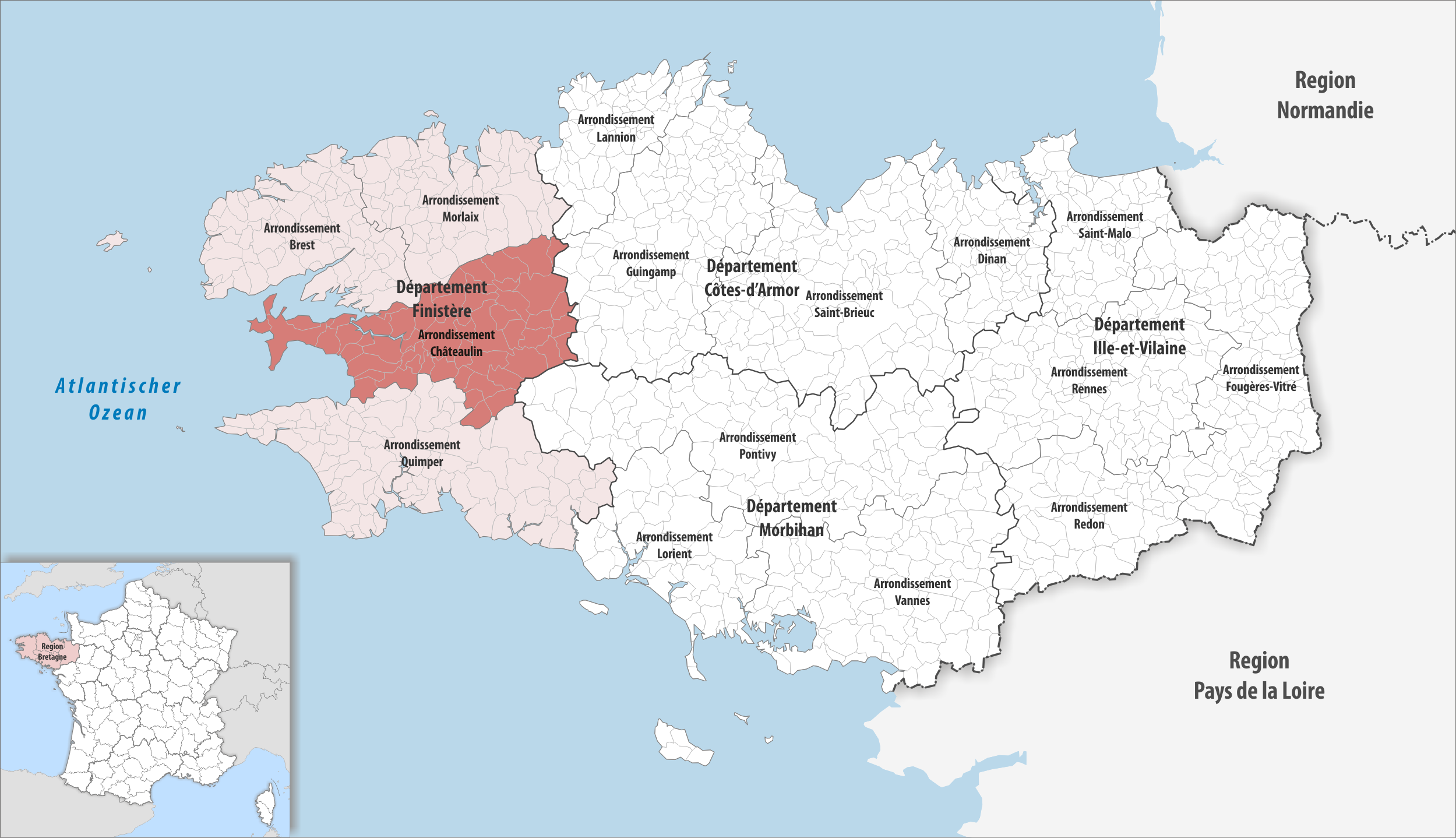 Lage des Arrondissements Châteaulin